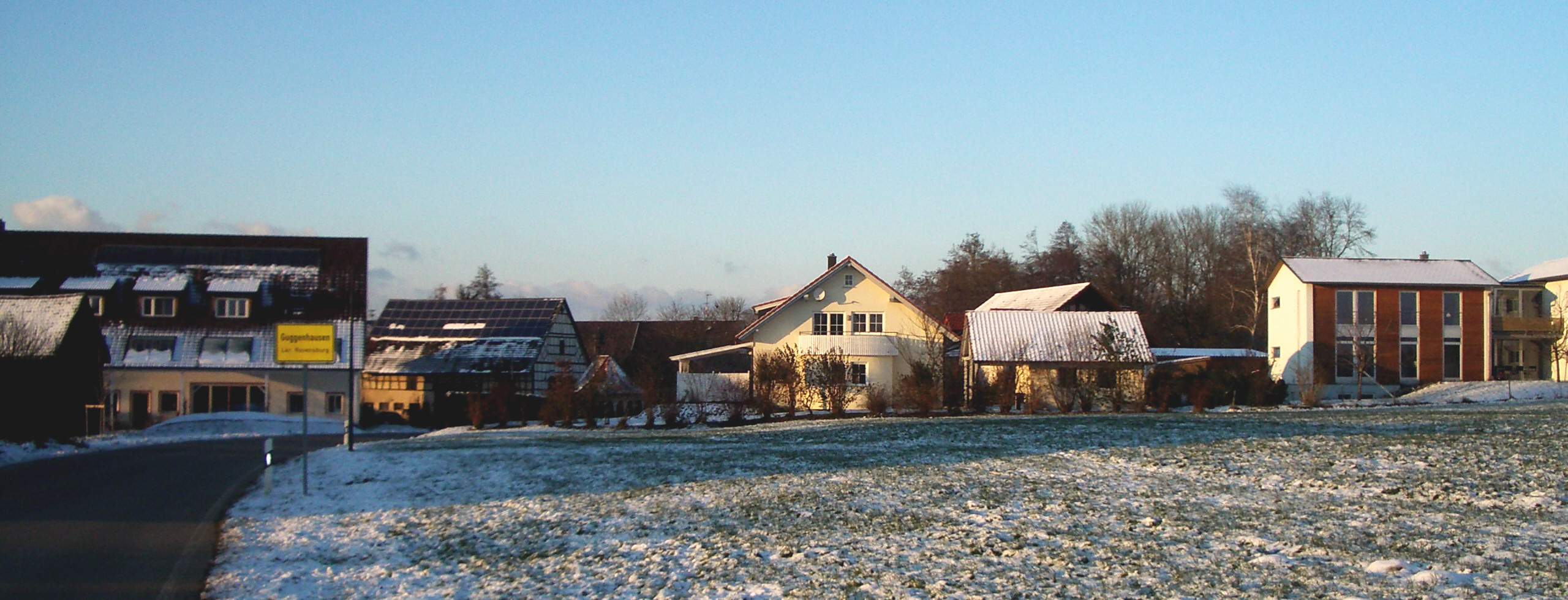 Guggenhausen, Landkreis Ravensburg, Germany